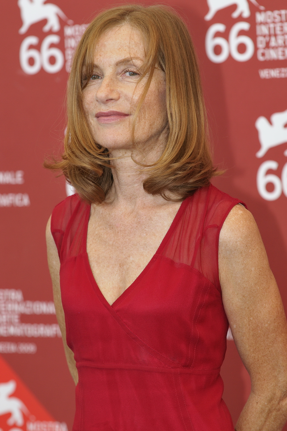 66ème Festival du Cinéma de Venise (Mostra), 5ème jour (06/09/2009) Photocall avec Isabelle Huppert pour le film en compétition : White Material